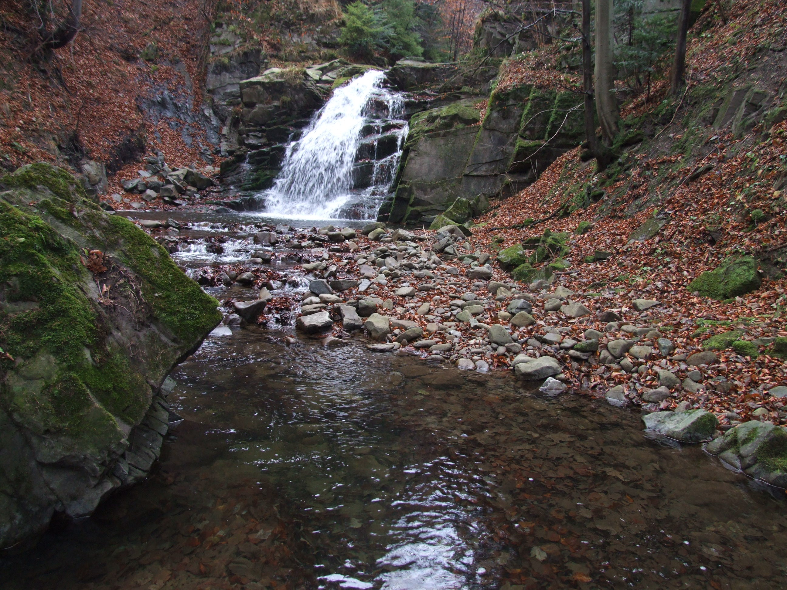 Majdański Potok i Wodospad Wielki w Obidzy